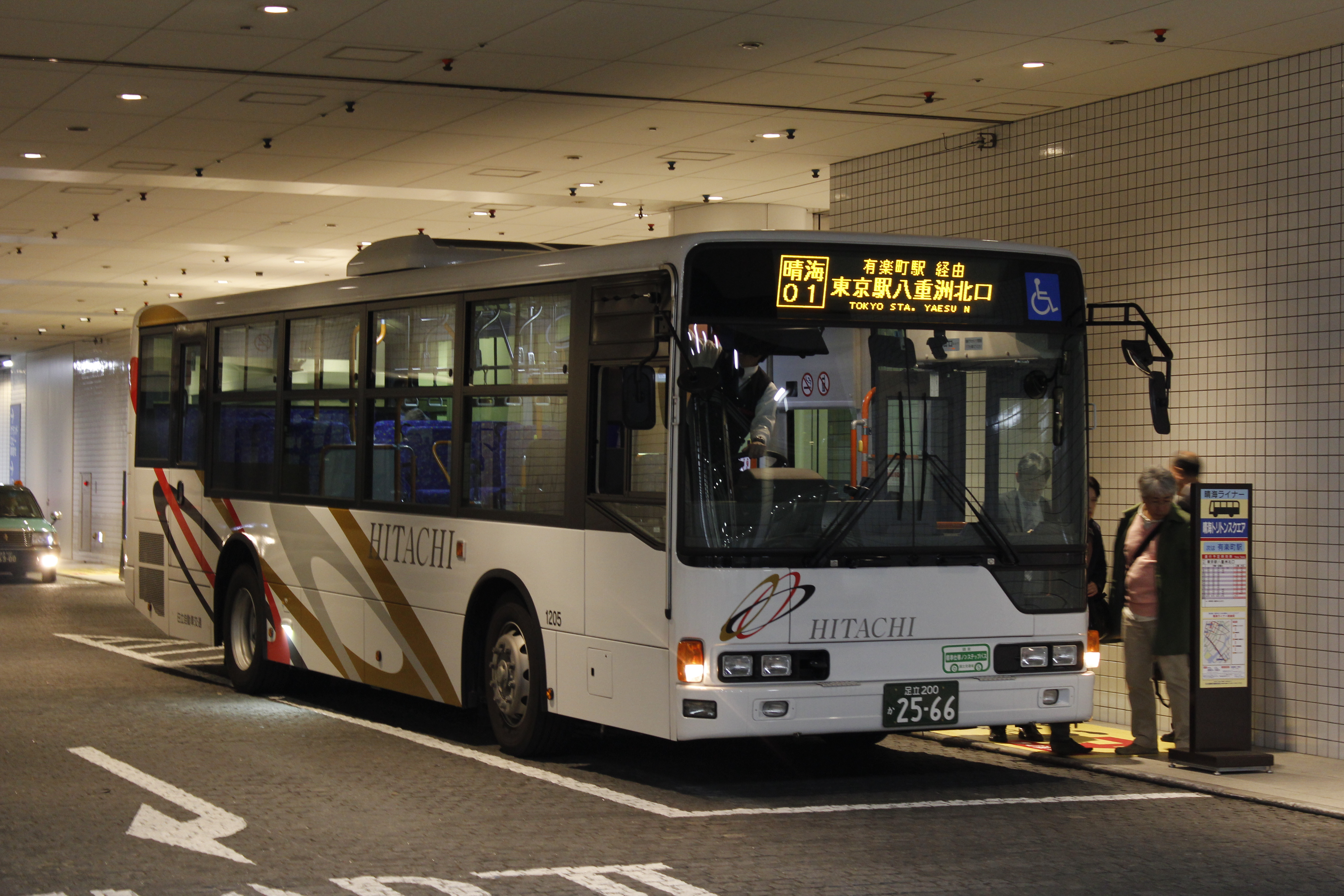 2013年4月4日 晴海トリトンスクエアにて